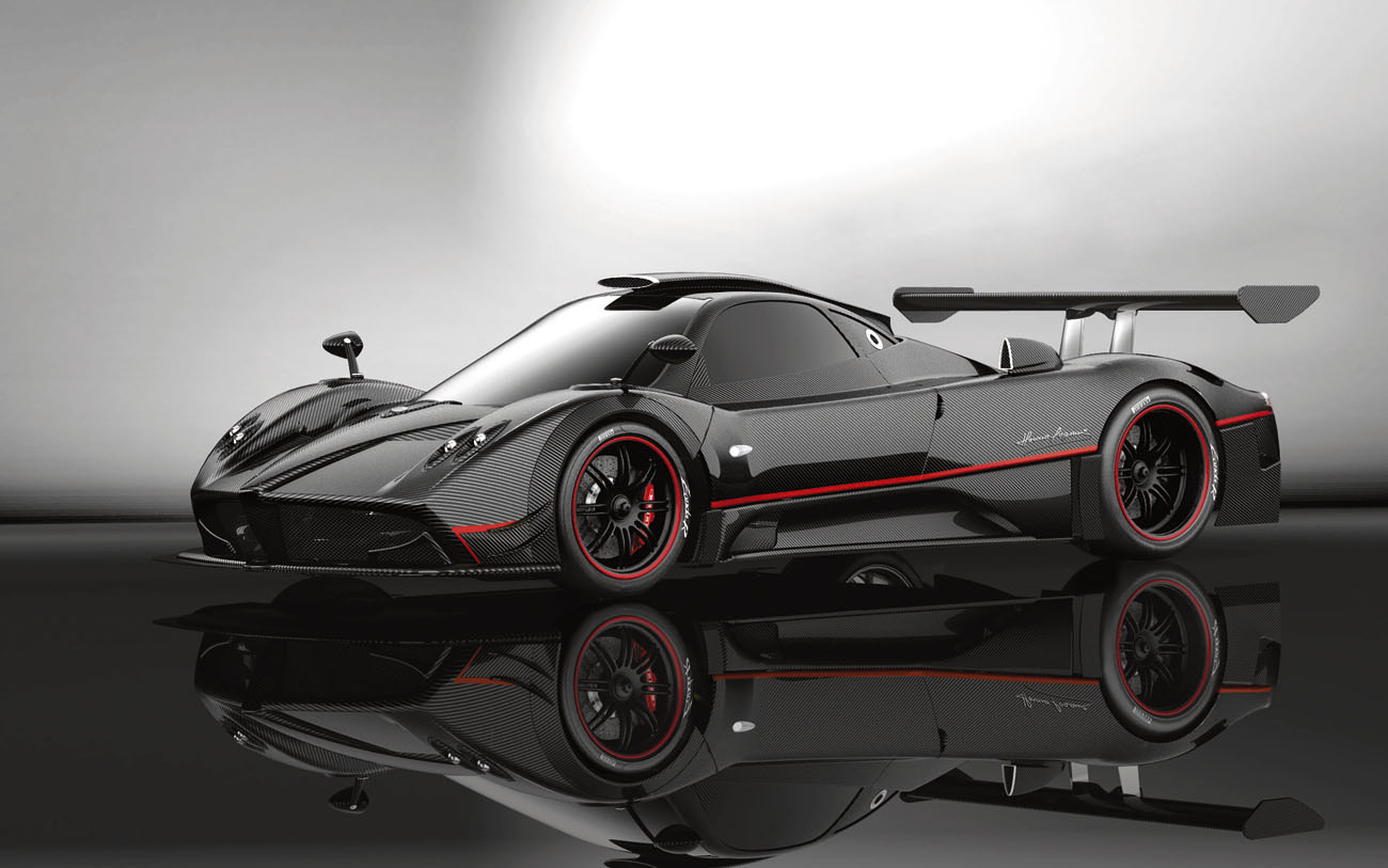 Pagani Zonda R, vista anteriore